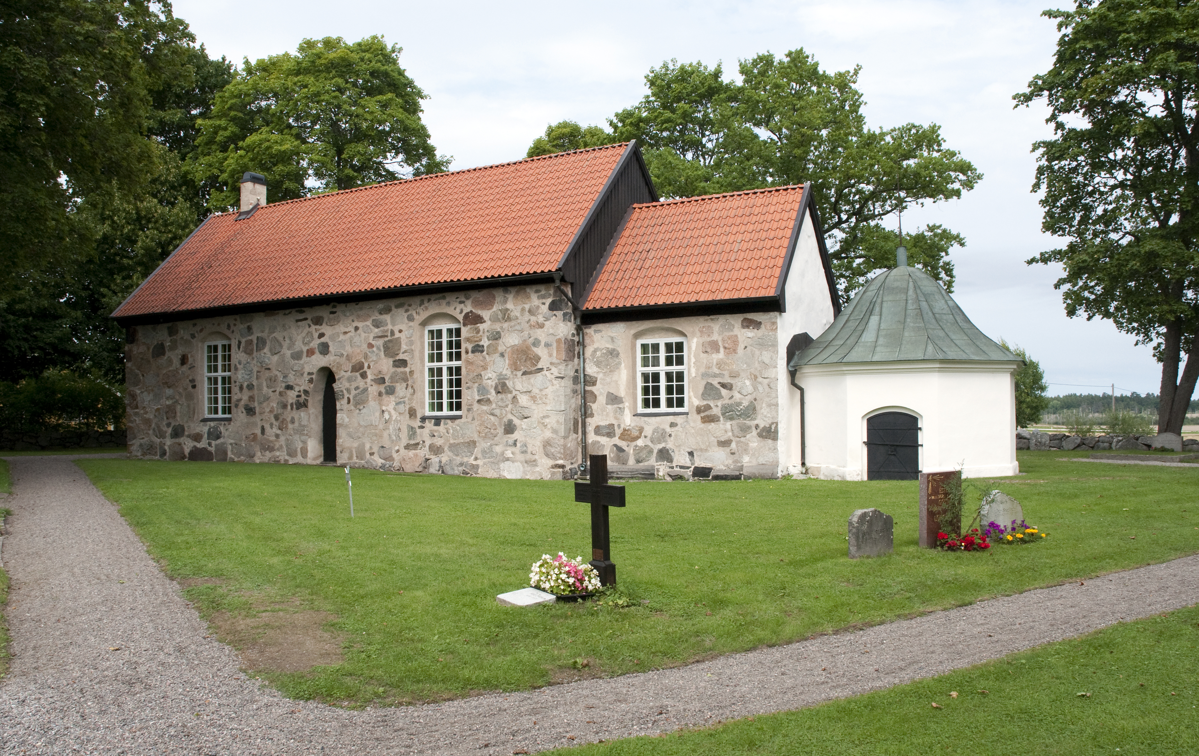 Nykyrka kyrka i Nyköpings kommun.